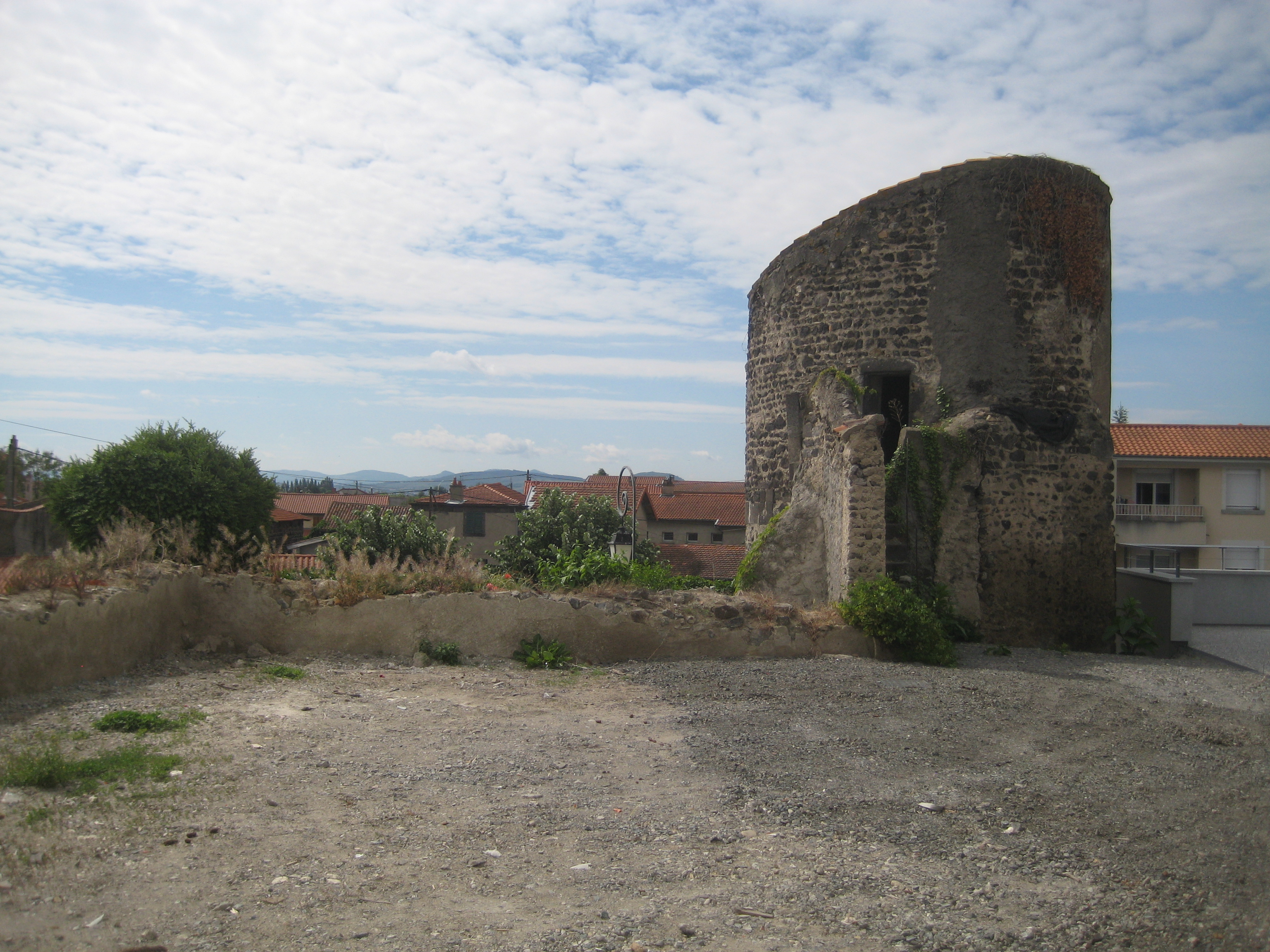 une des 9 tours de fortications de Gerzat